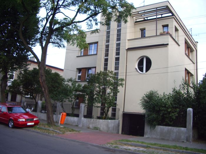 Poleska 16